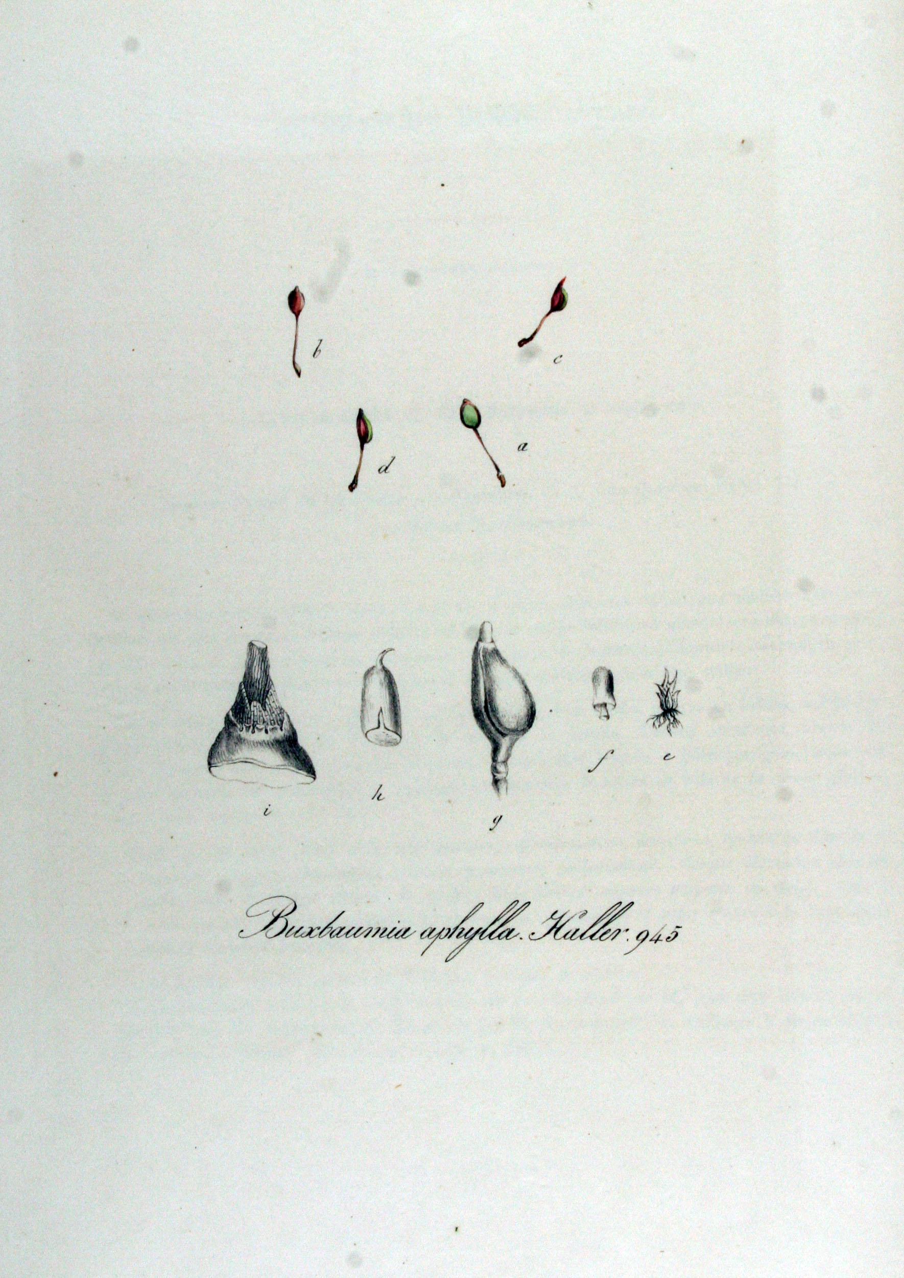 Buxbaumia aphylla